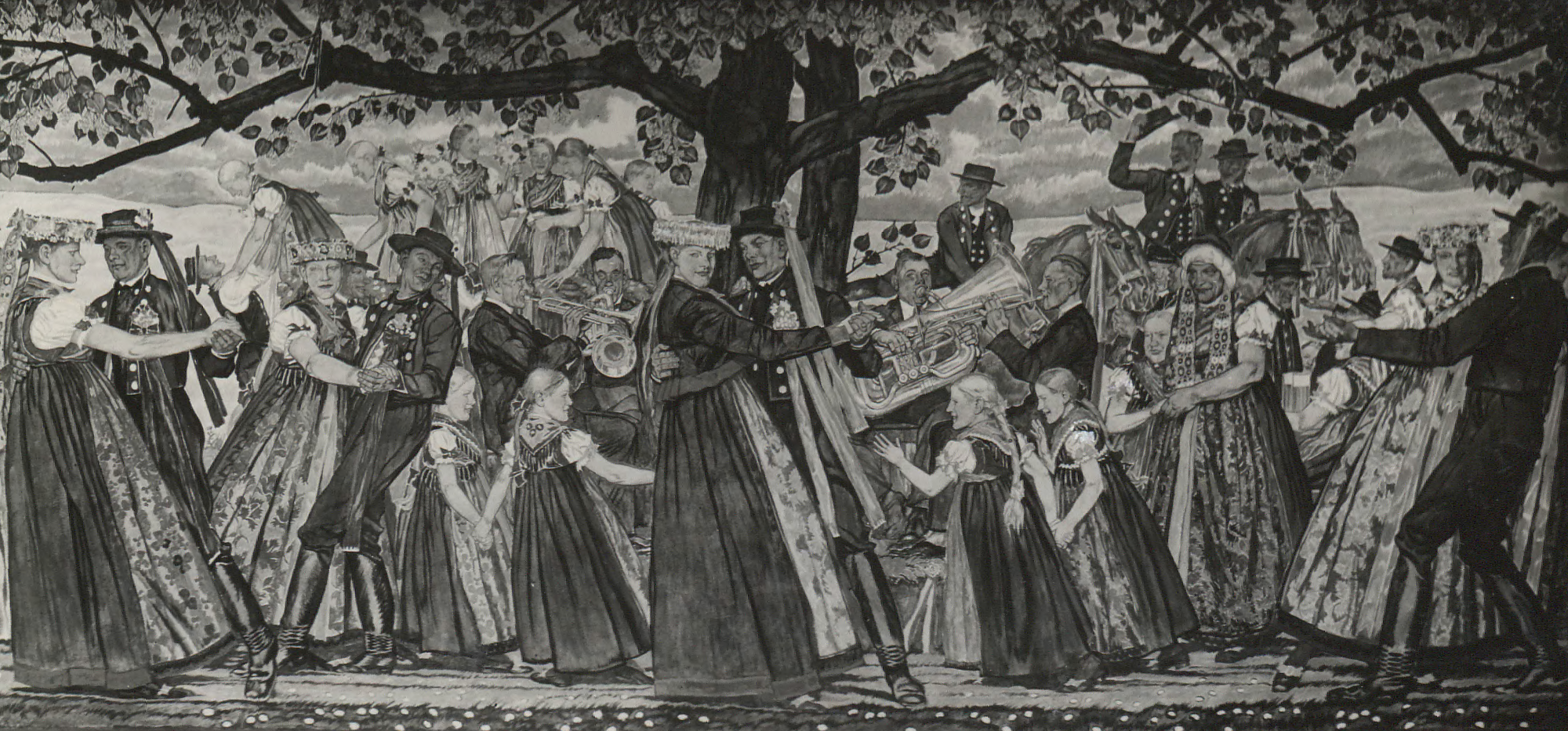 Wandgemälde "Der Tanz" von Prof. Münzer im Haus Oberschlesien in Gleiwitz. Es zeigt eine Schönwälder Hochzeit.